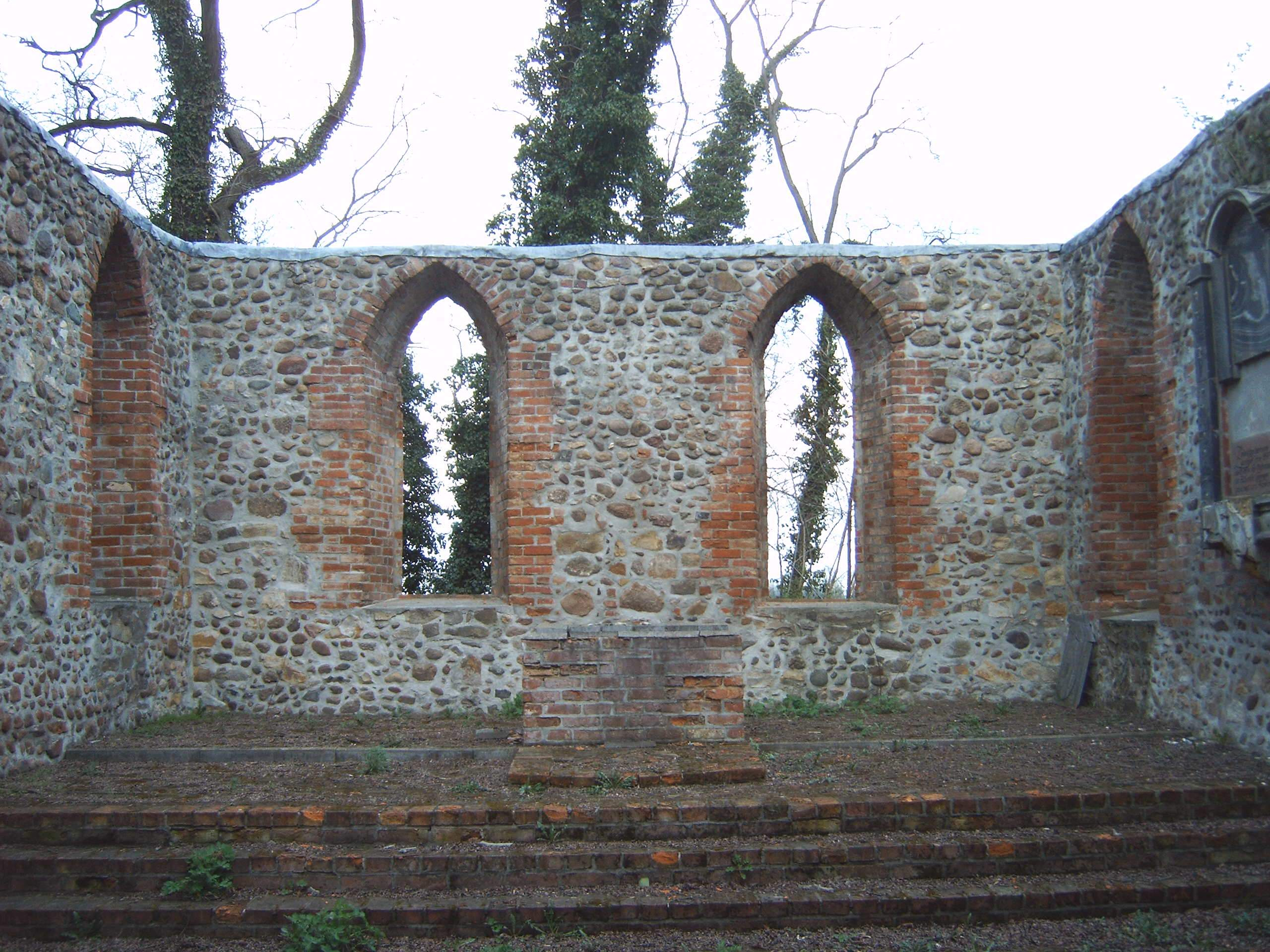 Ruine der Gutskapelle Pöthen, Pöthen, Gommern